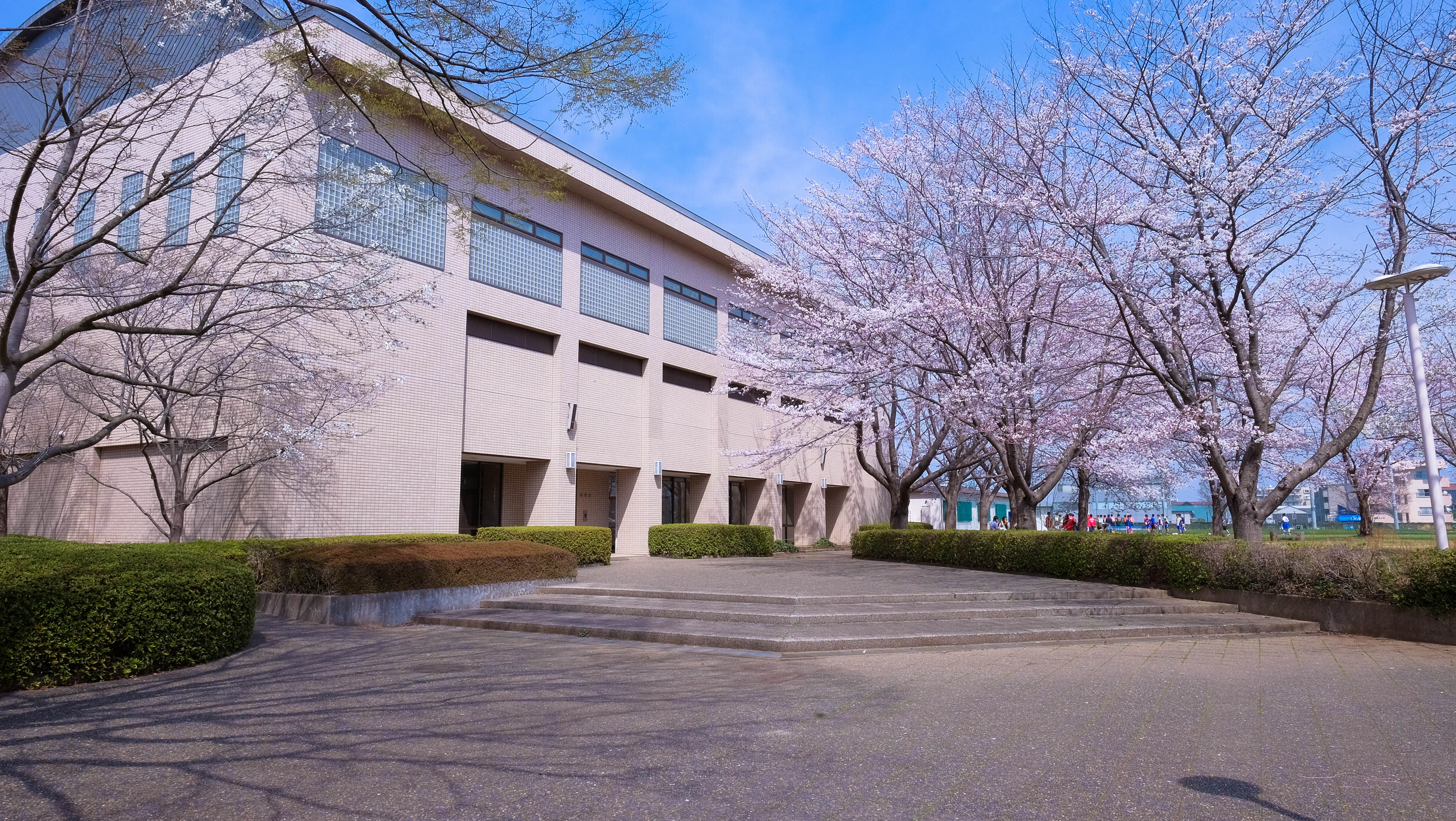 筑波学院大学